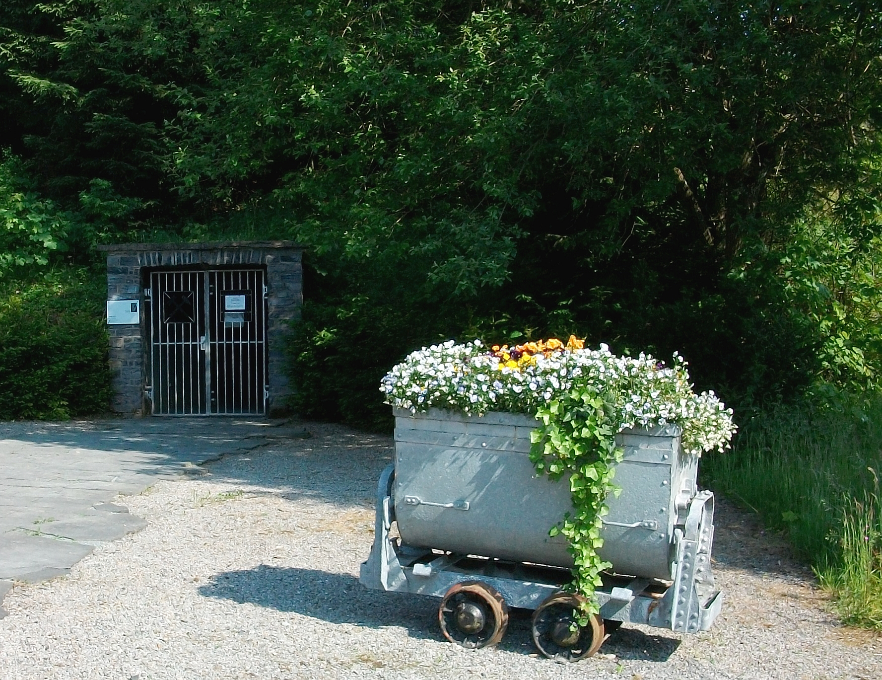 Schmallenberg, Abela-Heilstollen, früher Felicitas Stollen (Germany)